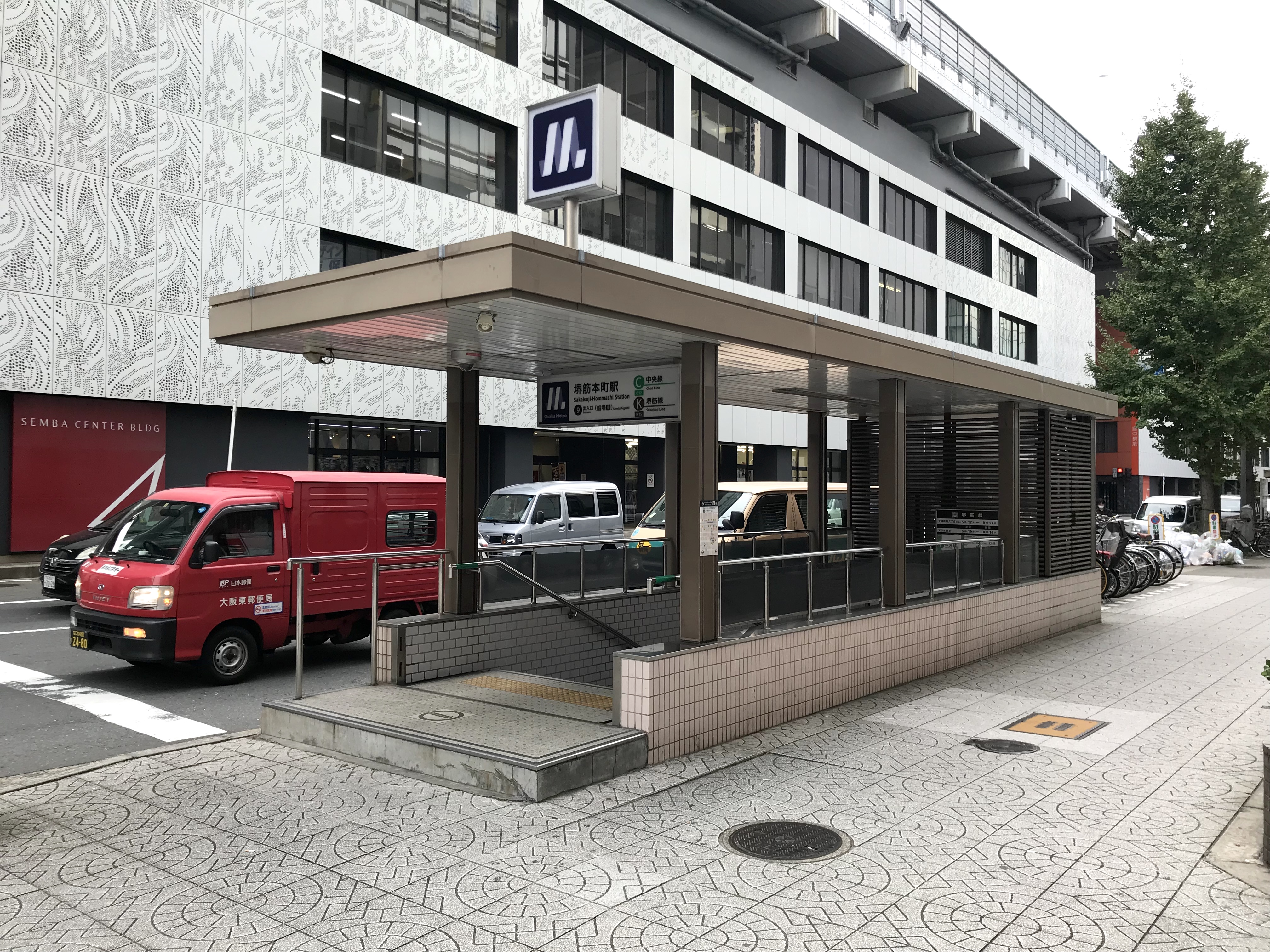 Osaka Metro堺筋線・中央線堺筋本町駅9号出入口